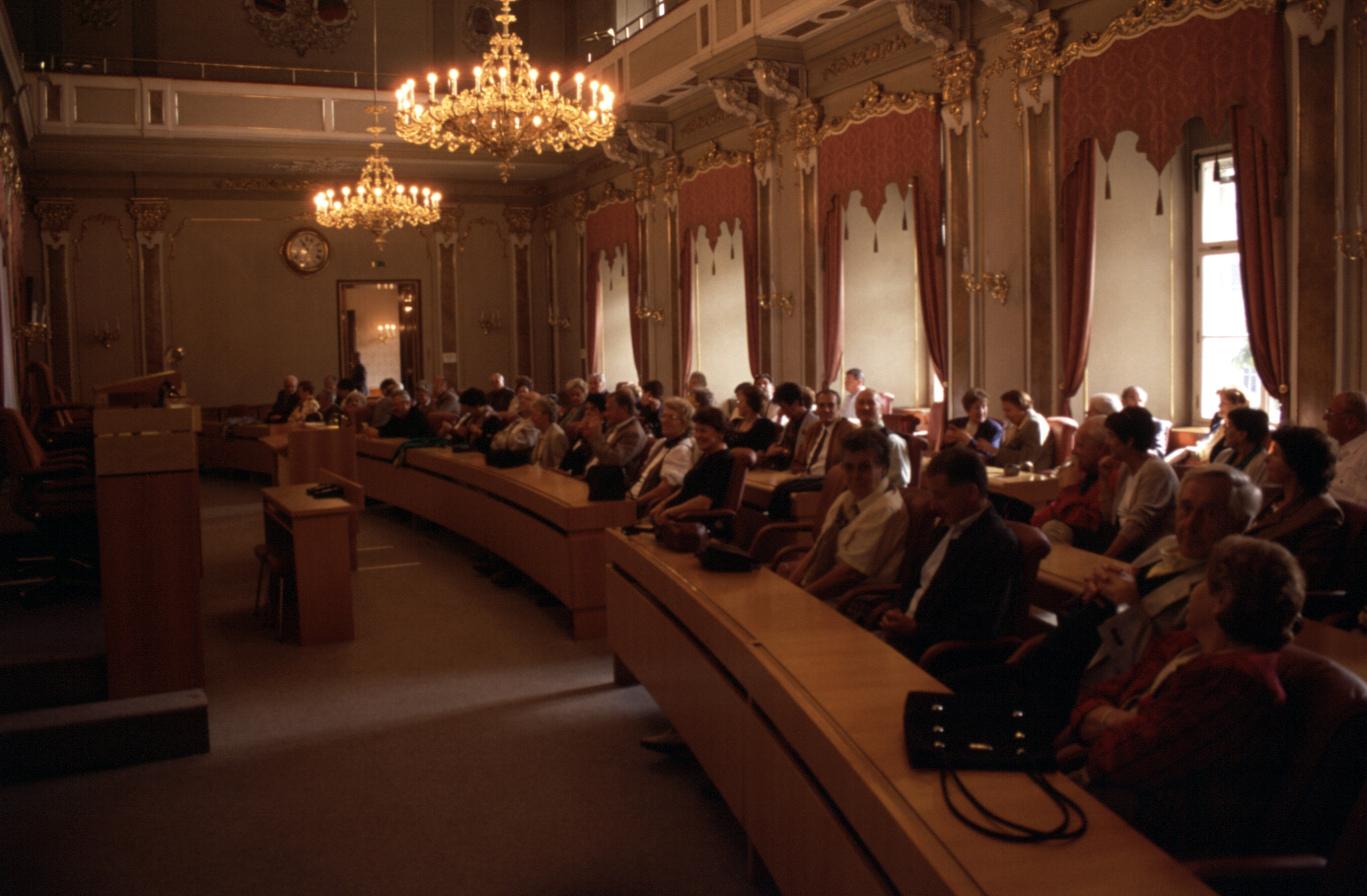 Landtagssaal im Landhaus Linz, September 1999.